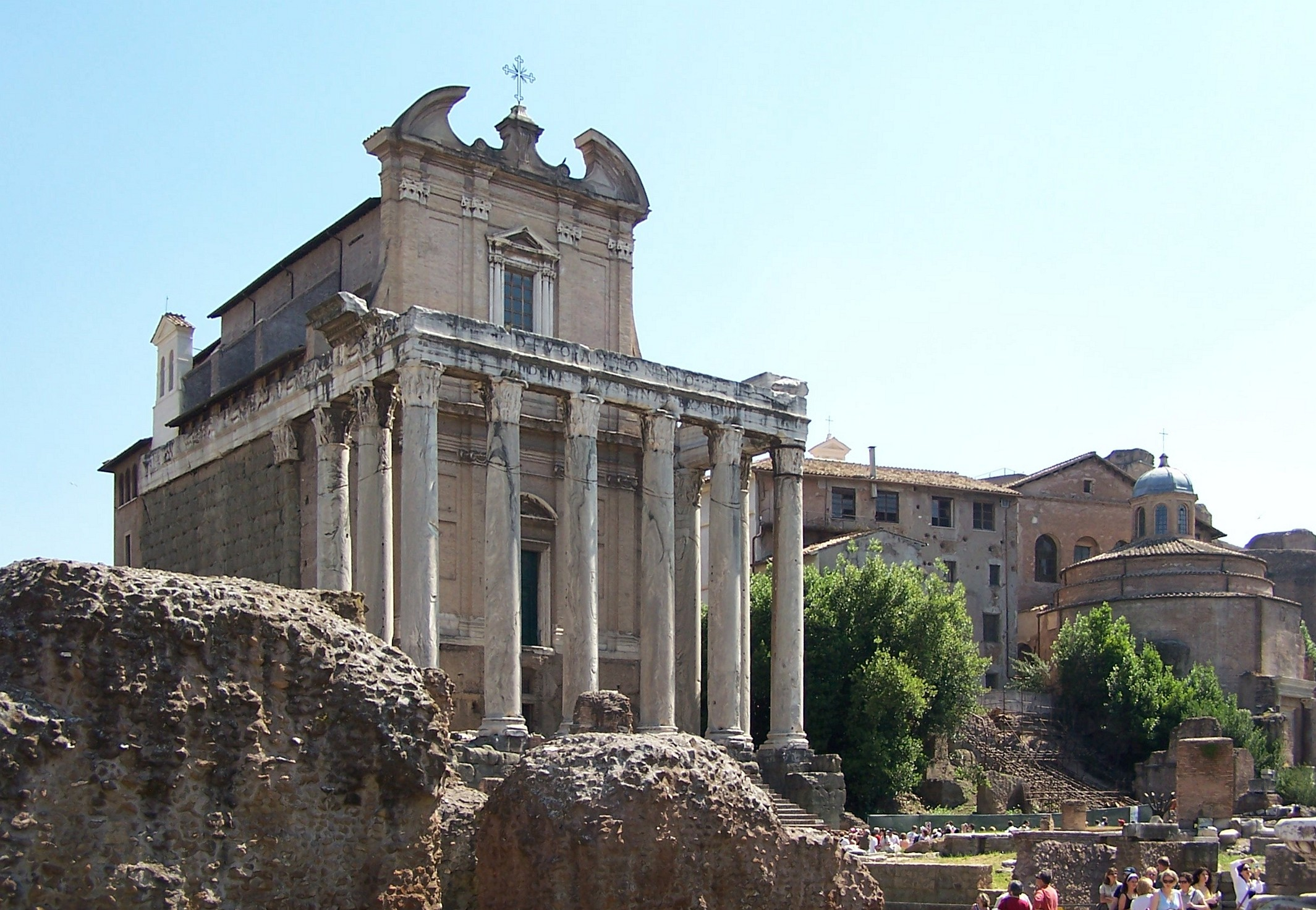 Forum Romanum, Tempel des Antoninus Pius und der Faustina